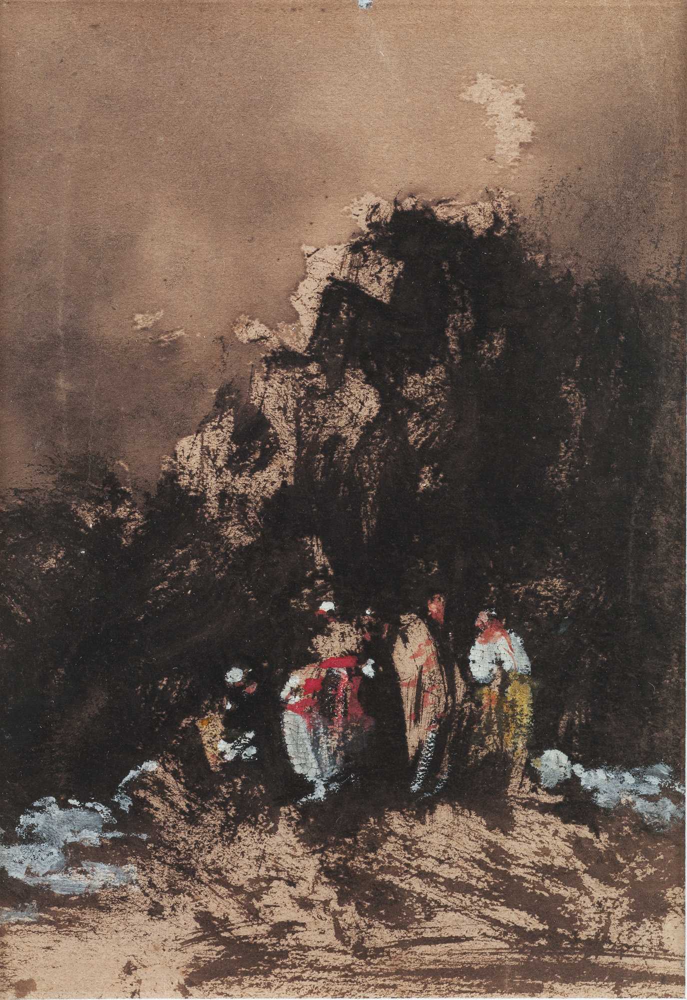 Figuras en un paisaje. Eugenio Lucas